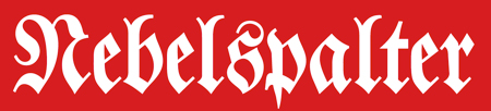 Logo Nebelspalter, Schweiz